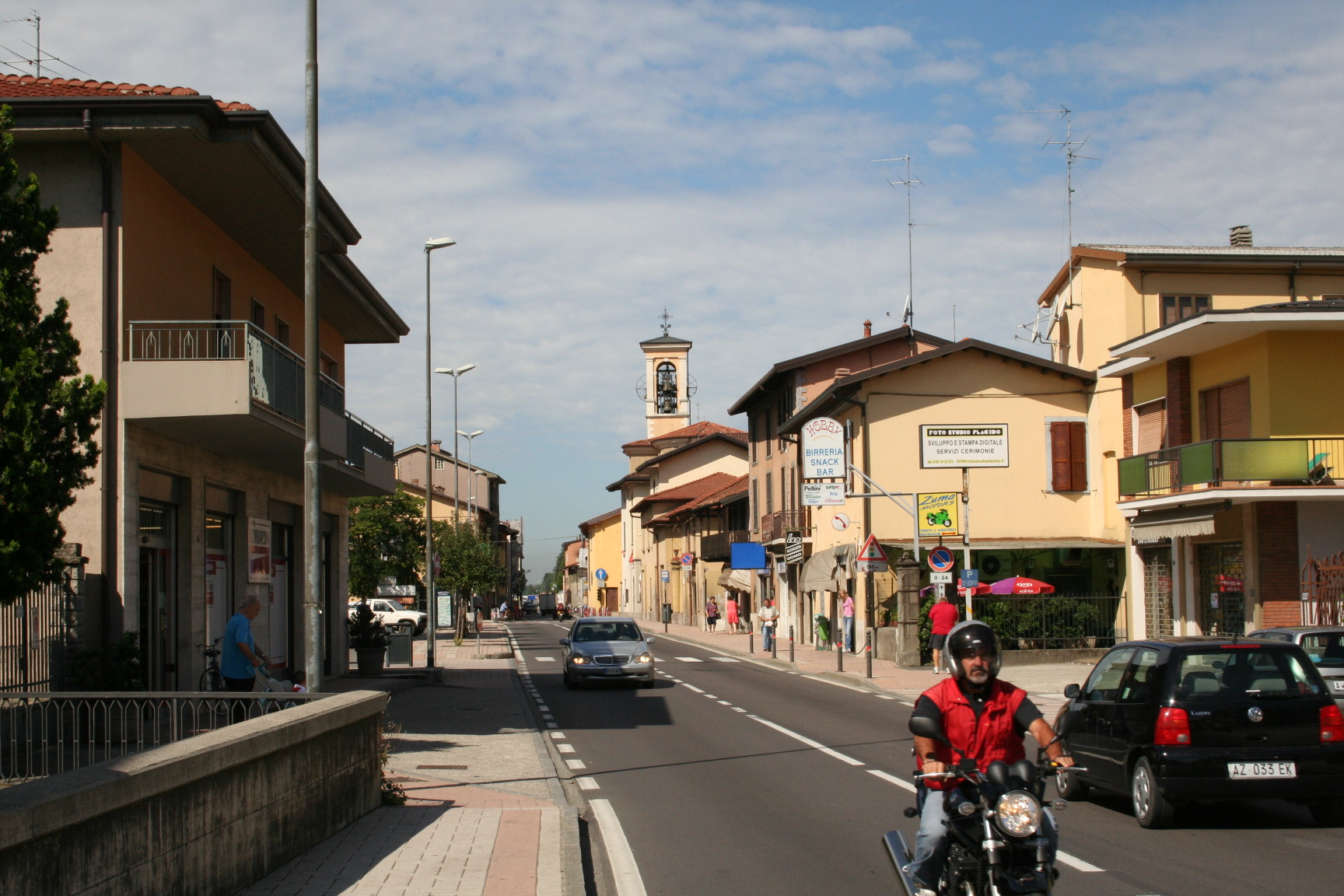 Presezzo, Bergamo, panorama.